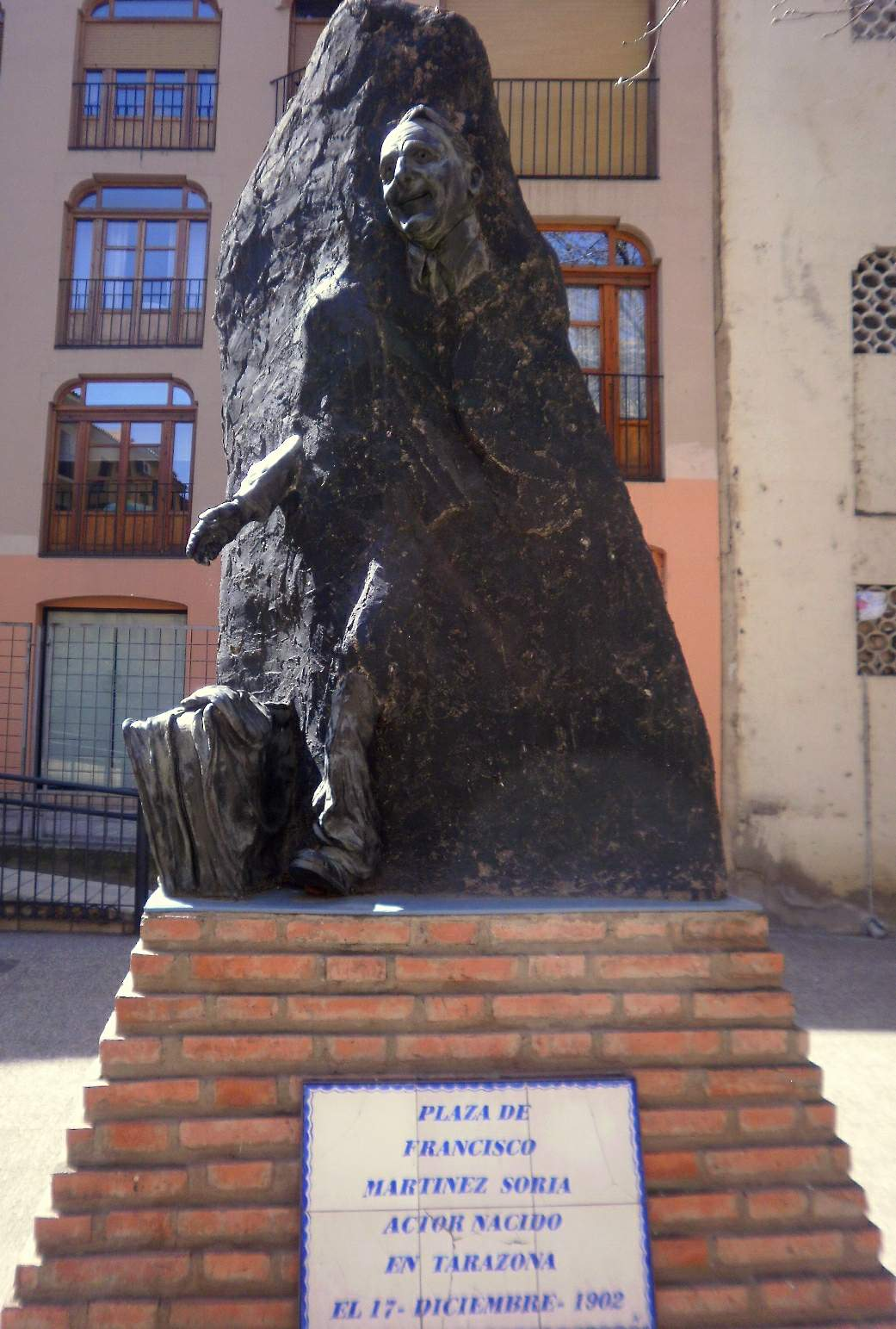 Monumento al actor turiasonense Paco Martínez Soria, en Tarazona (Zaragoza, Aragón, España)